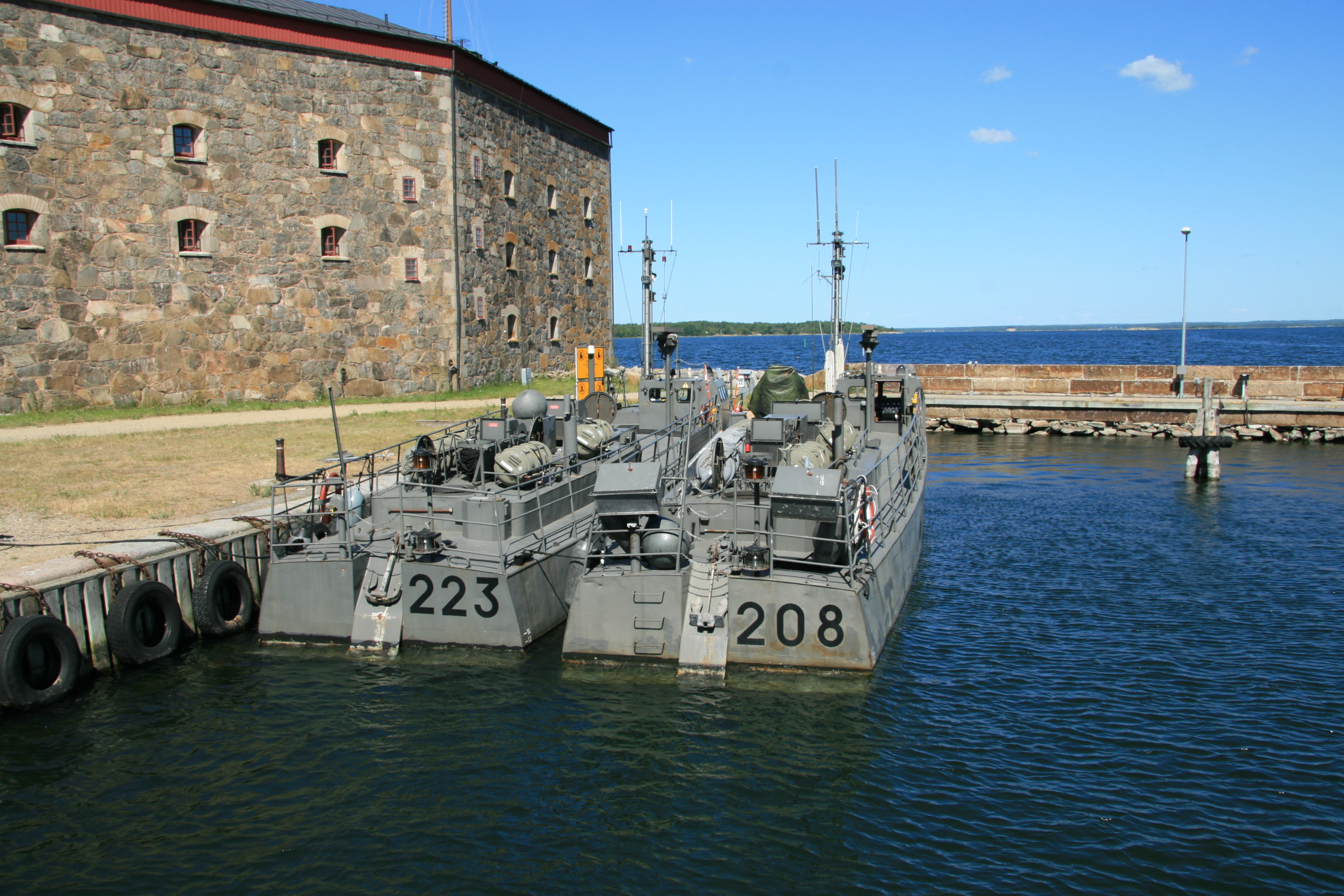 200-båtar vid Kungsholms Fort, Karlskrona 14 juli 2006.